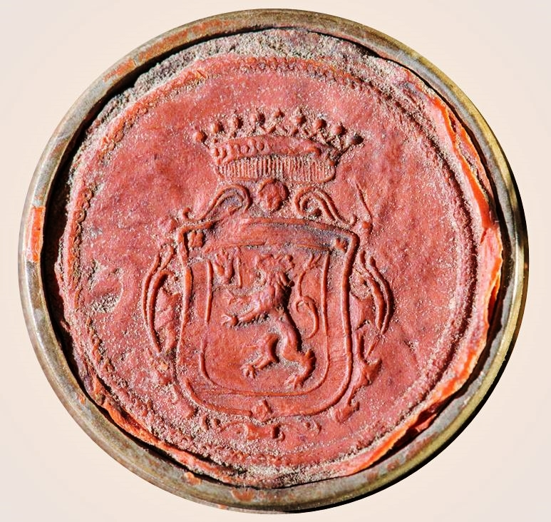 Siegel der von Curti von 1699 der Ehefrau von Carl Wilhelm v. Curti, Anna Helena v. Curti geb. Schenck zu Schweinsberg.